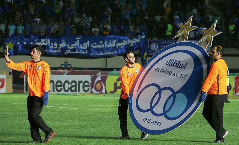 فینال جام حذفی فوتبال بین تیم‌های استقلال تهران و خونه به خونه مازندران